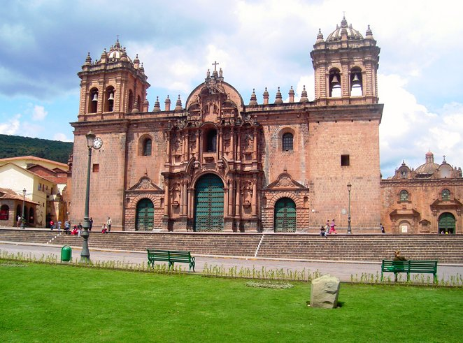 Catedral del Cuzco. El diseño está conformado, por la base, de una cruz latina, la fachada es de estilo renacentista, muy ornamental, y en su interior, también renacentista, se encuentran las mejores expresiones de orfebrería colonial, talladas en madera de cedro y aliso, como el púlpito, así como una valiosa colección de lienzos de la Escuela Cusqueña. La acompañan a sus lados dos capillas auxiliares, la de El Triunfo y Jesús, María y José.